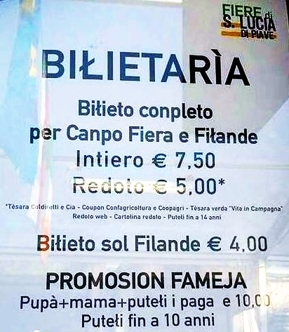 Vèneto: Foto ciapada da ła fiera de Santa Lucia (TV) co i cartełi scriti in Veneto.